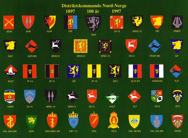 Bruk av Den norske løve og annet på militære avdelingsmerker under Distriktskommando Nord-Norge.